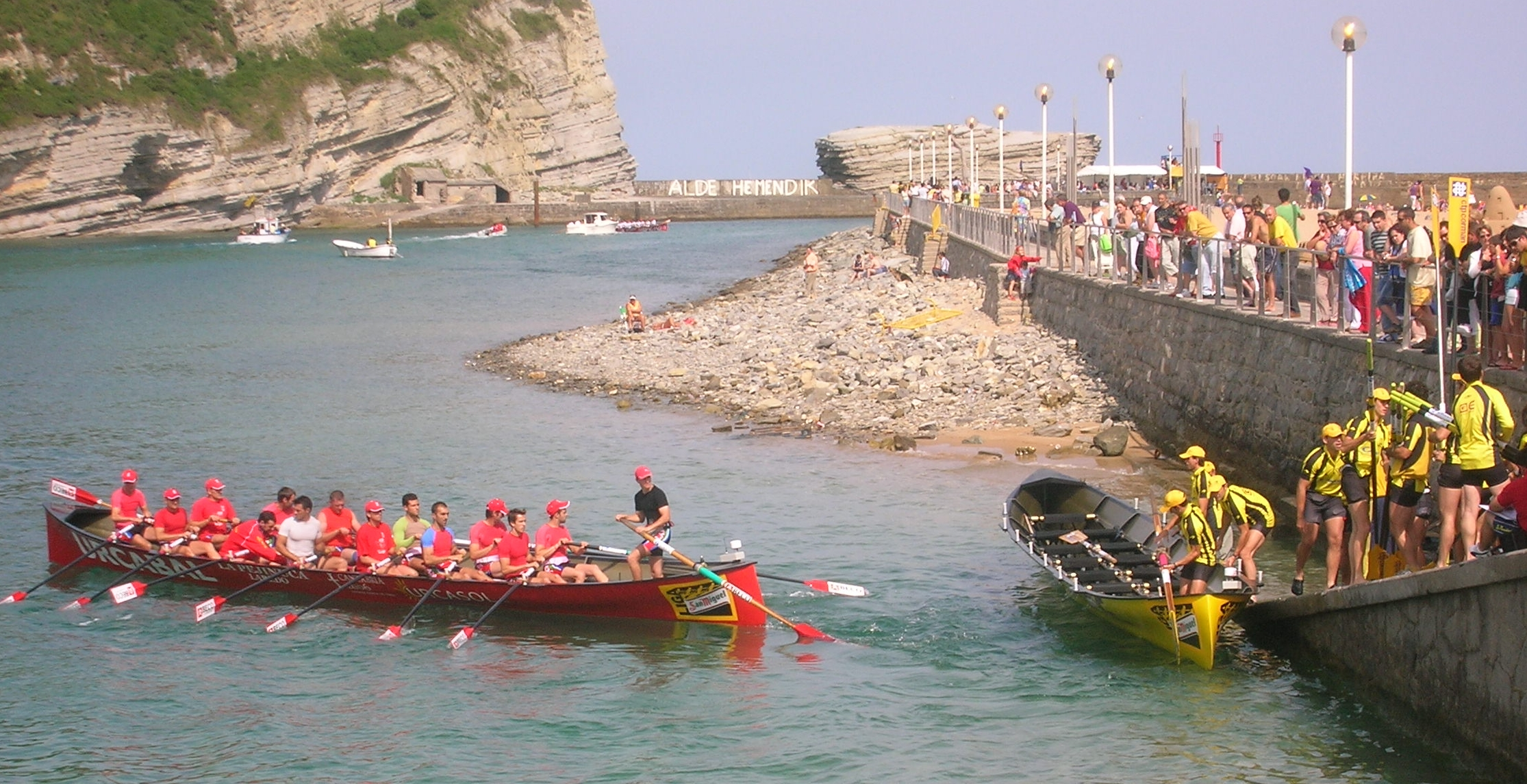 Traineras en la Ría de Plencia-Plentzia el día de la XIX Bandera de Plentzia. La trainera roja es la Pejinuca, del Laredo Remo Club. La amarilla es San Nikolas, del Club de Remo Orio.